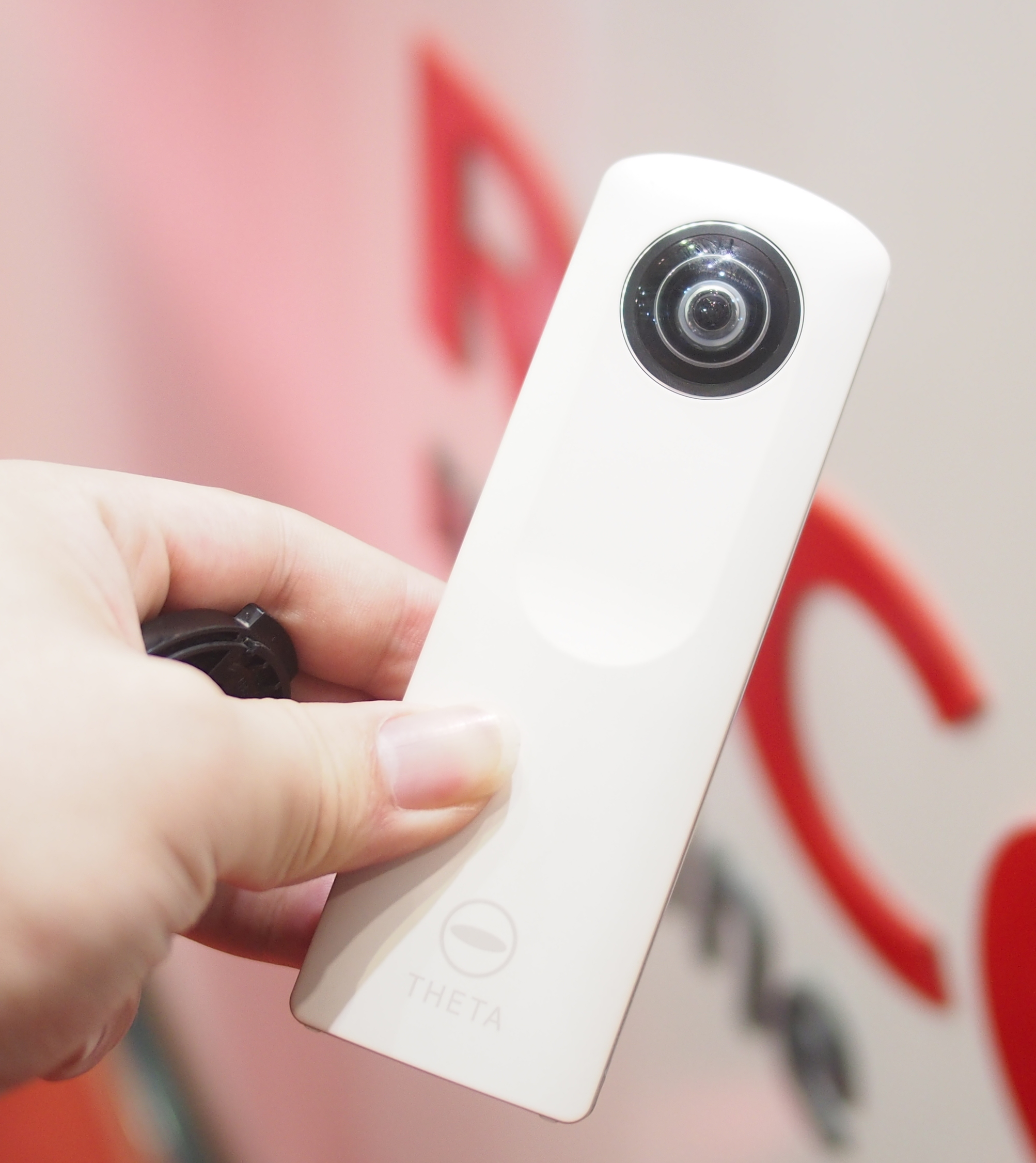 理光公司的THETA相机，两面各有一枚圆周鱼眼镜头，一次拍摄可以机内合成为全天球的全景照片。